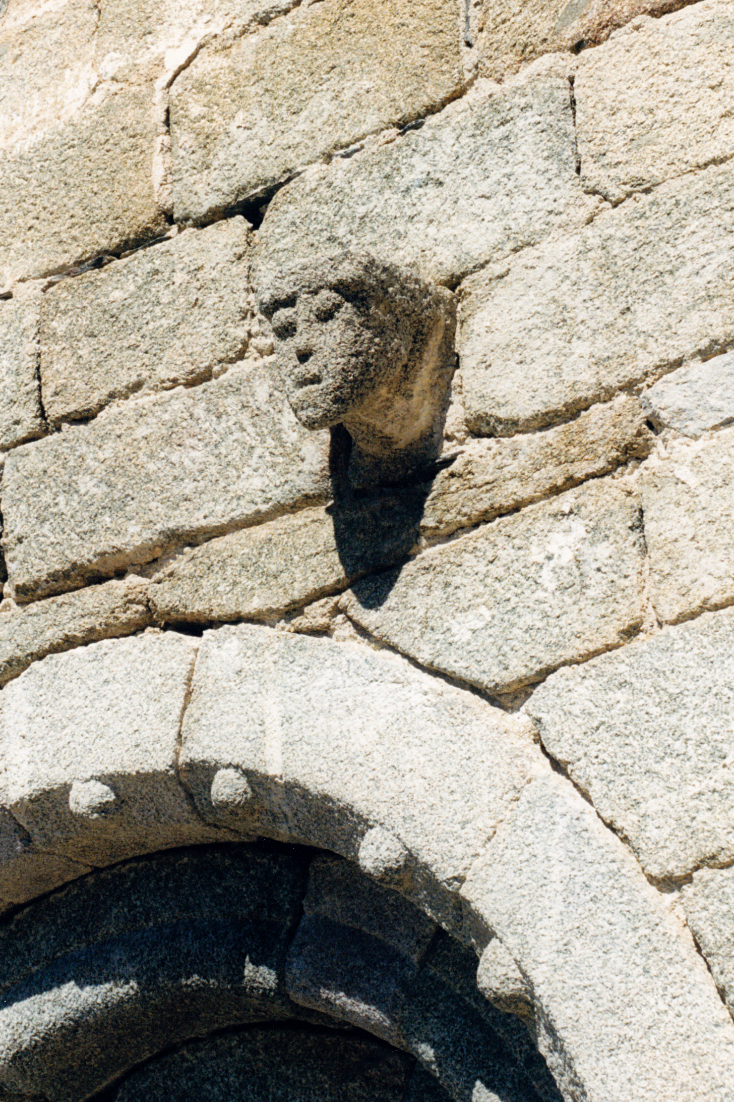 France - Cerdagne - Église Sainte-Colombe de Vià